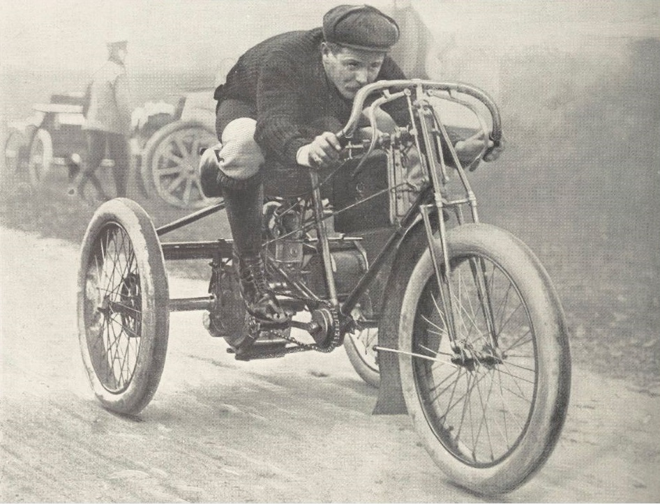 Georges Osmont sur Griffon en 1901, La Vie au Grand Air du 29 décembre 1901, p. 796